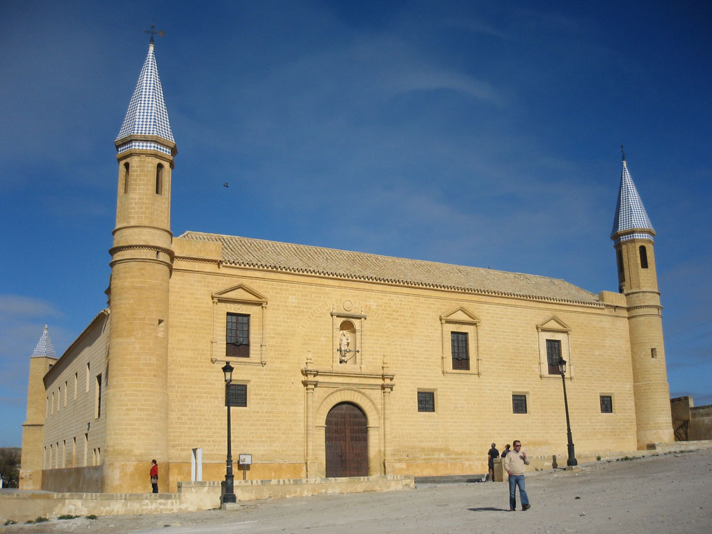 Universidad de Osuna, en Osuna (provincia de Sevilla, Andalucía, España).